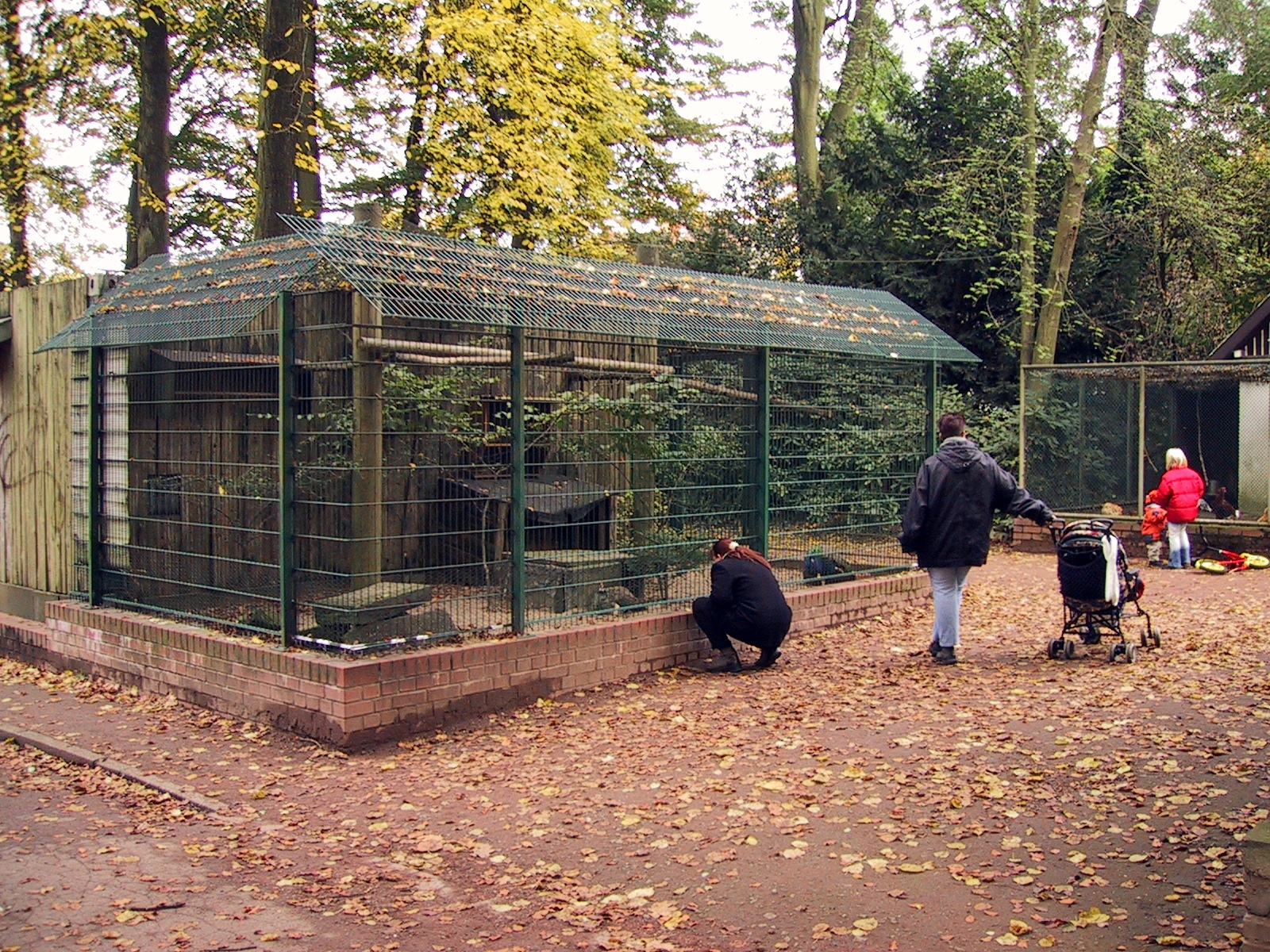 Vogelgehege im Stadtpark Wattenscheid Source: own work Date: Autum 2002, Bochum-Wattenscheid, Germany Author: Maschinenjunge Licence: GFDL, cc-by 3.0